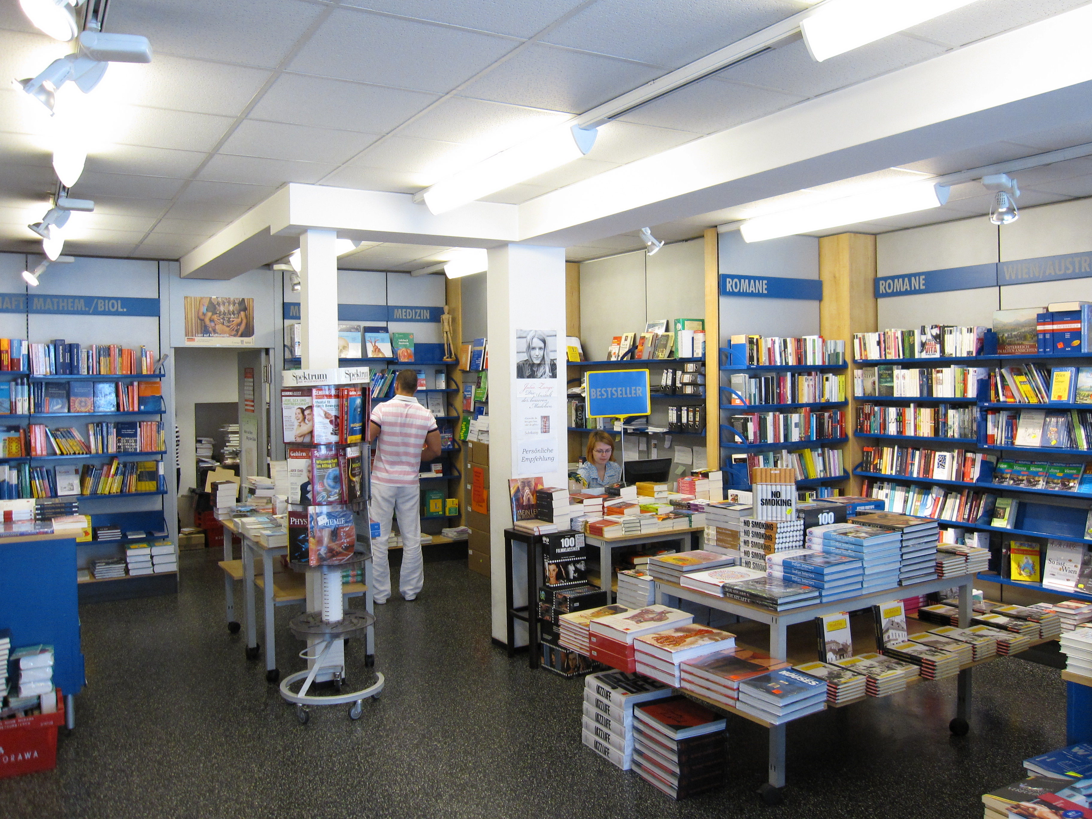 Beck'sche Universitätsbuchhandlung at Waehringer Strasse in Vienna.